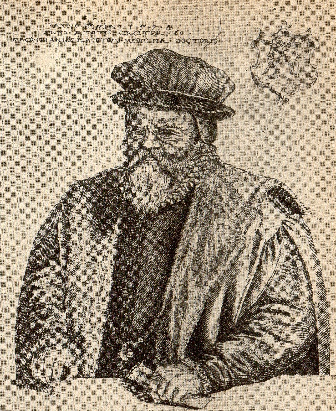 Johannes Brettschneider - Jan Placotomus, gdański profesor medycyny (1574 r.).